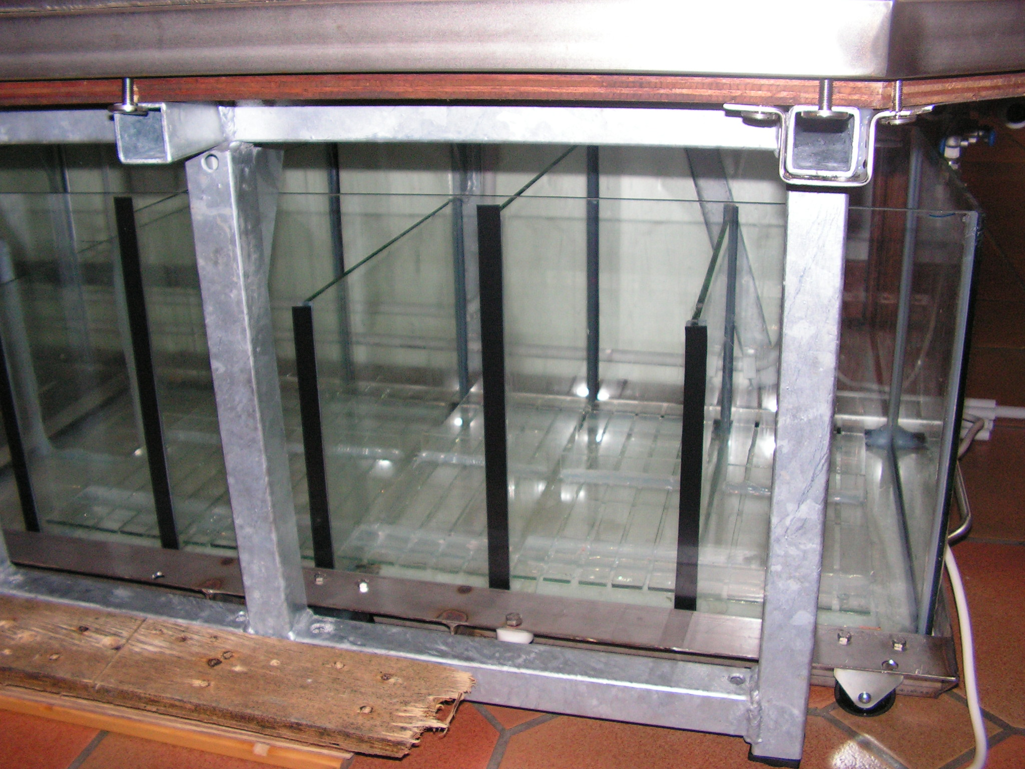 Description Detailopname van een biofilter Date29 January 2005SourceOwn workAuthorDiscus Detailopname van een biofilter